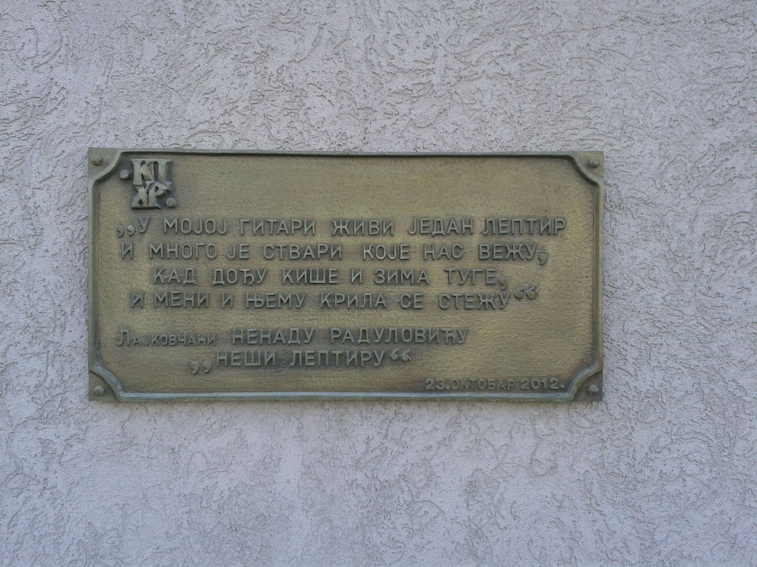 Spomen ploča Nenadu Raduloviću "Neši Leptiru" u Lajkovcu